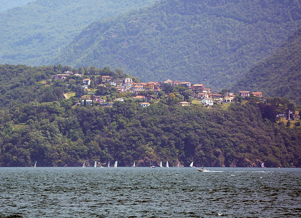 Olgiasca am Comersee, Blick von Dongo